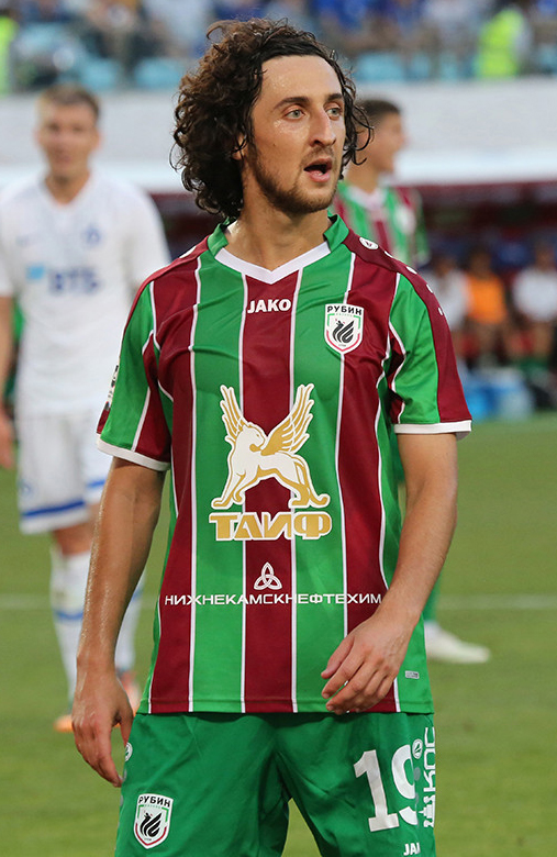 «Динамо» и «Рубин» обменялись голами